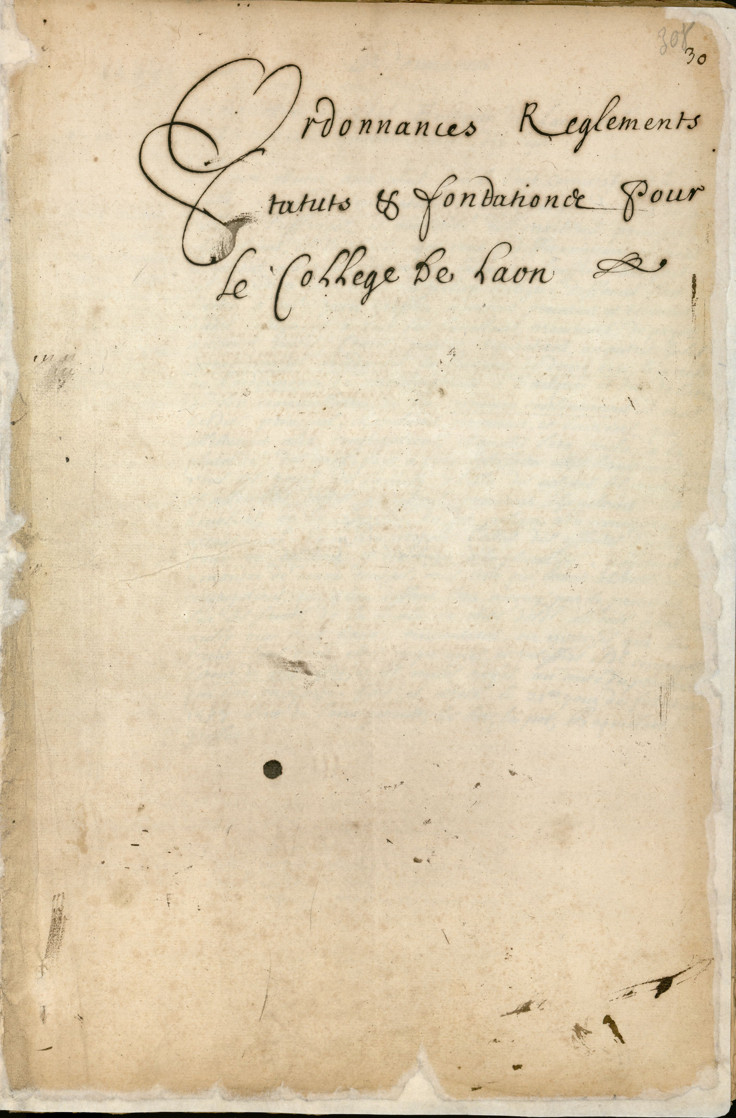 Manuscrit, dans un registre de 738 feuillets consacré aux fondations et statuts des collèges.